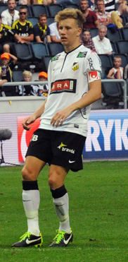 Simon Gustafsson